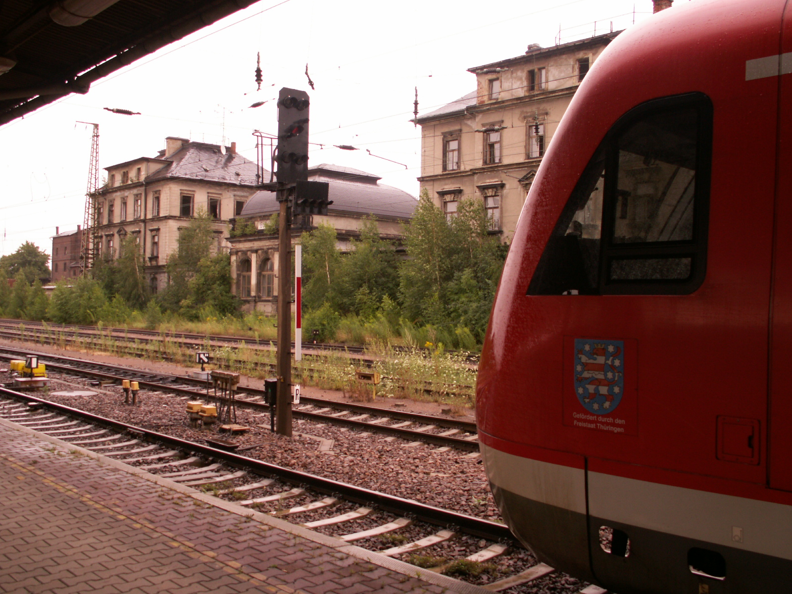 Bahnhof Gößnitz (Thüringen)